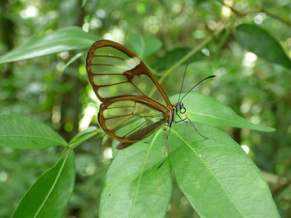 Greta Oto - Togui,Boyaca Colombia